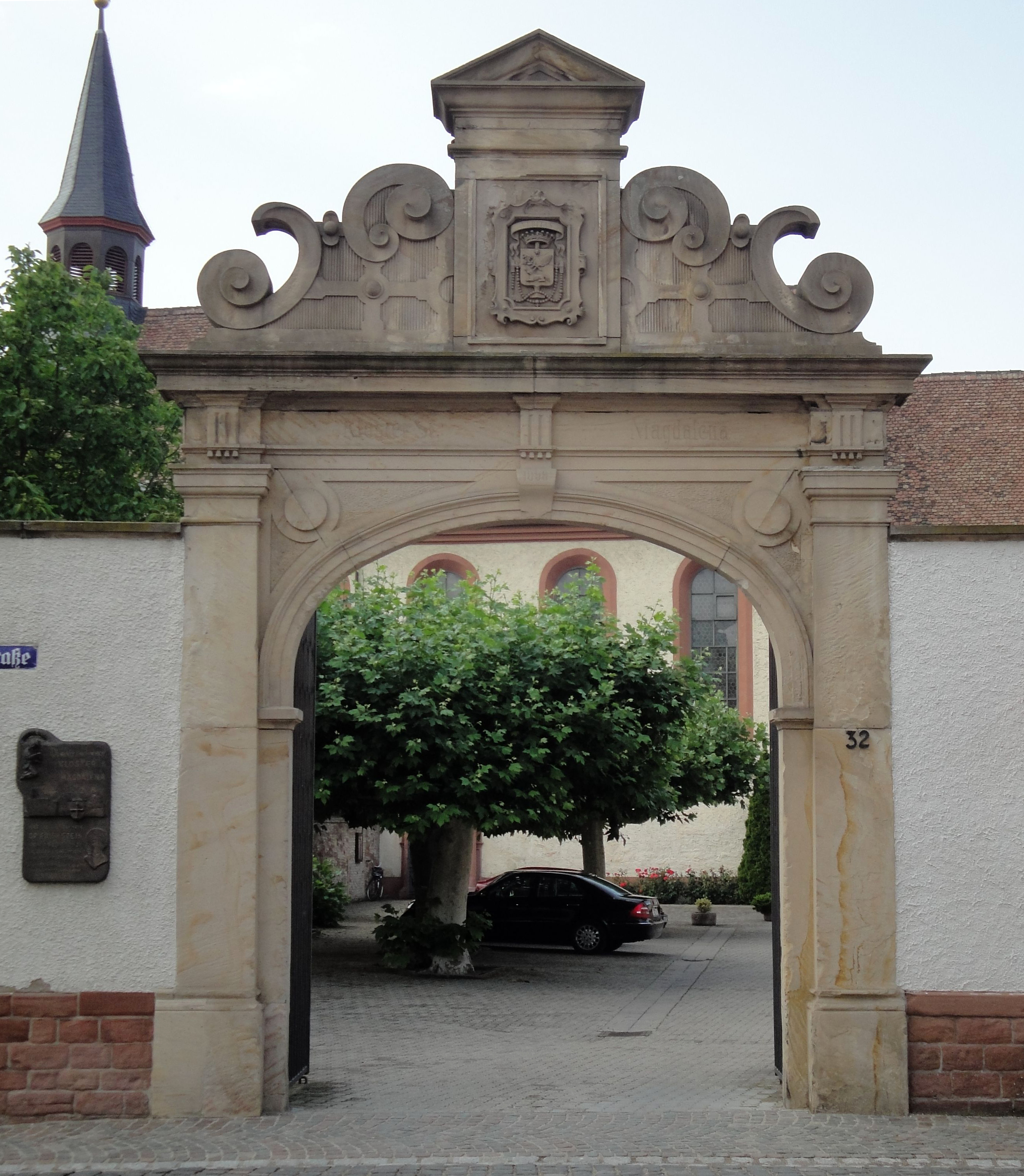 Portal des Klosters St. Magdalena in der Hasenpfuhlstrasse 32 in Speyer